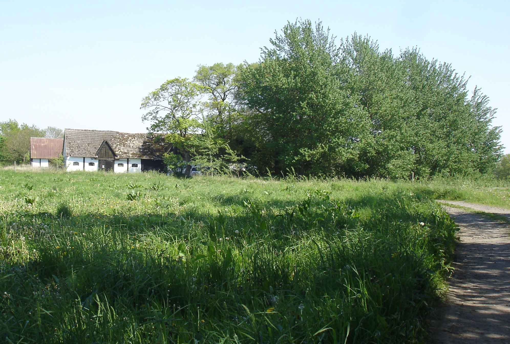 Markusgård, Carsten Seegers "præsidentpalæ" uden for Østermarie